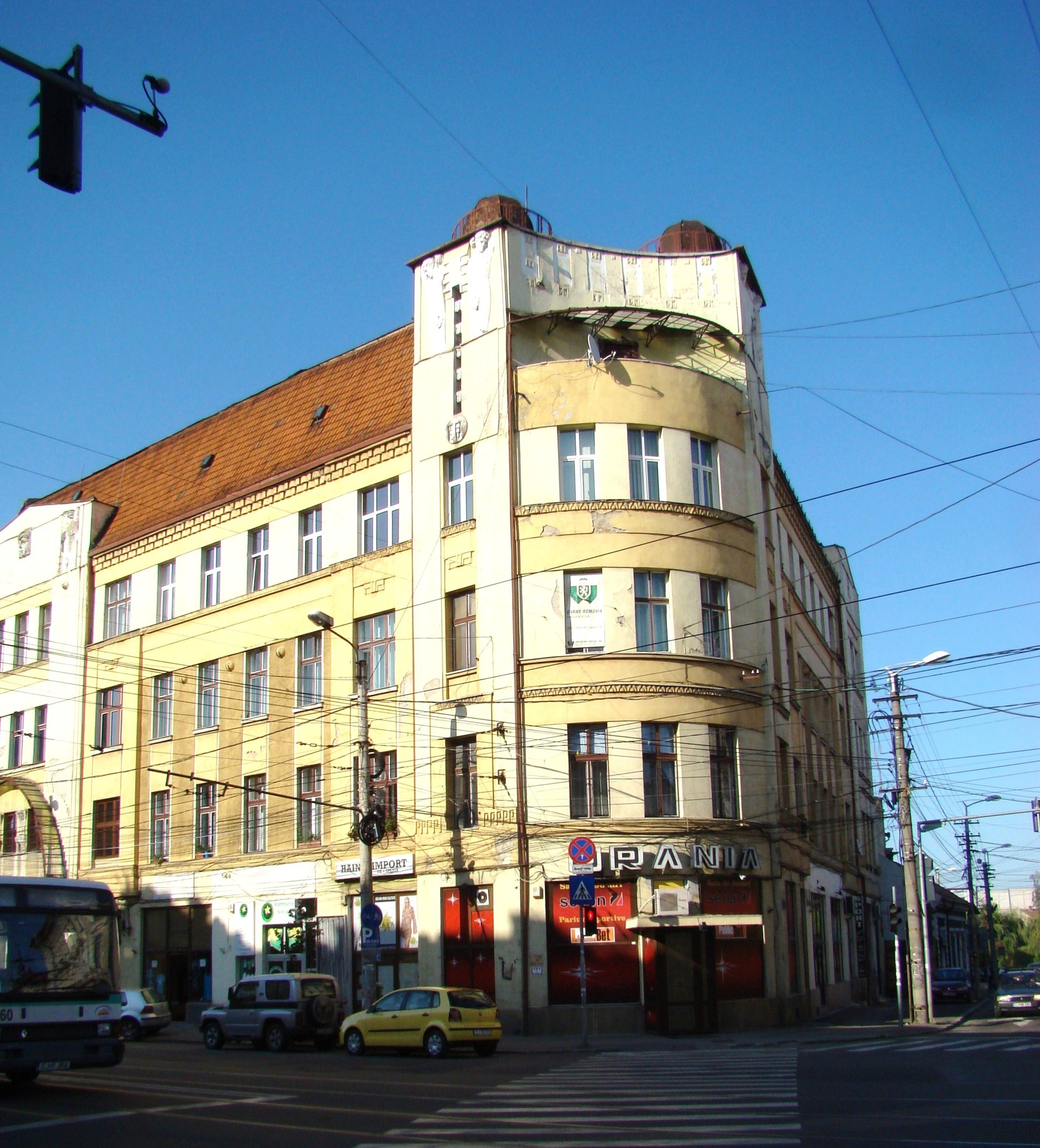 Clădire monument istoric, str.Horea, nr.4-6